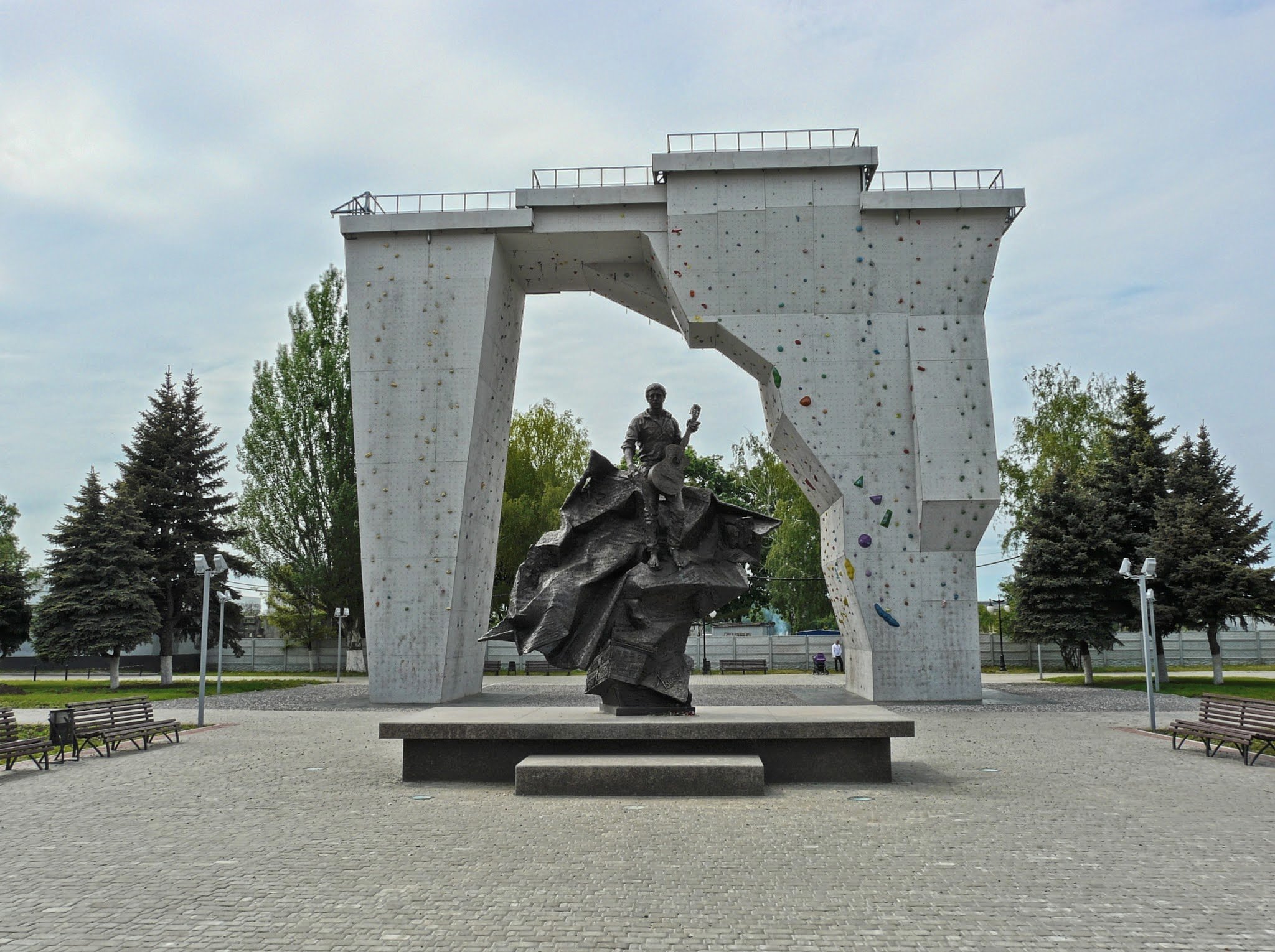 Frunzens'kyi District, Kharkiv, Kharkiv Oblast, Ukraine